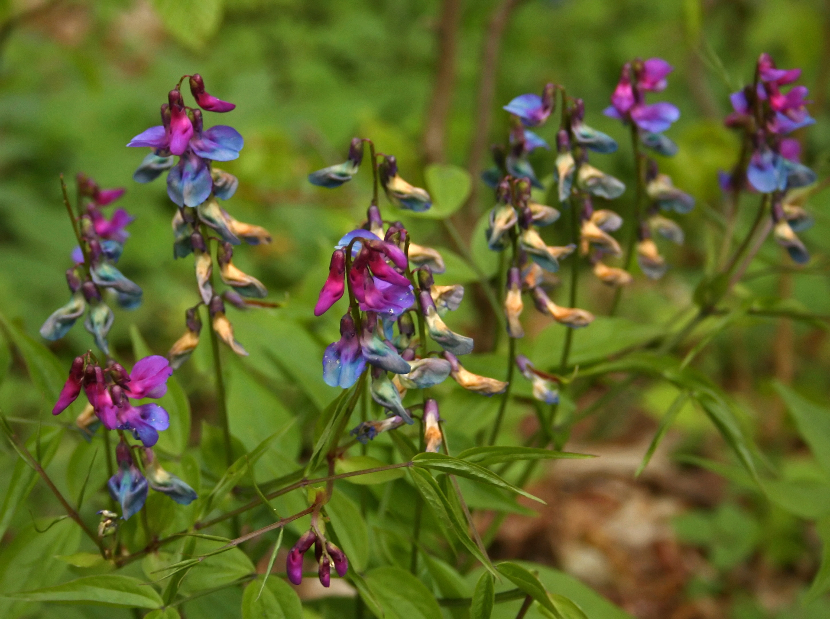 groszek wiosenny